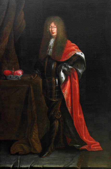 Obraz Leopold Ignaz of Dietrichstein